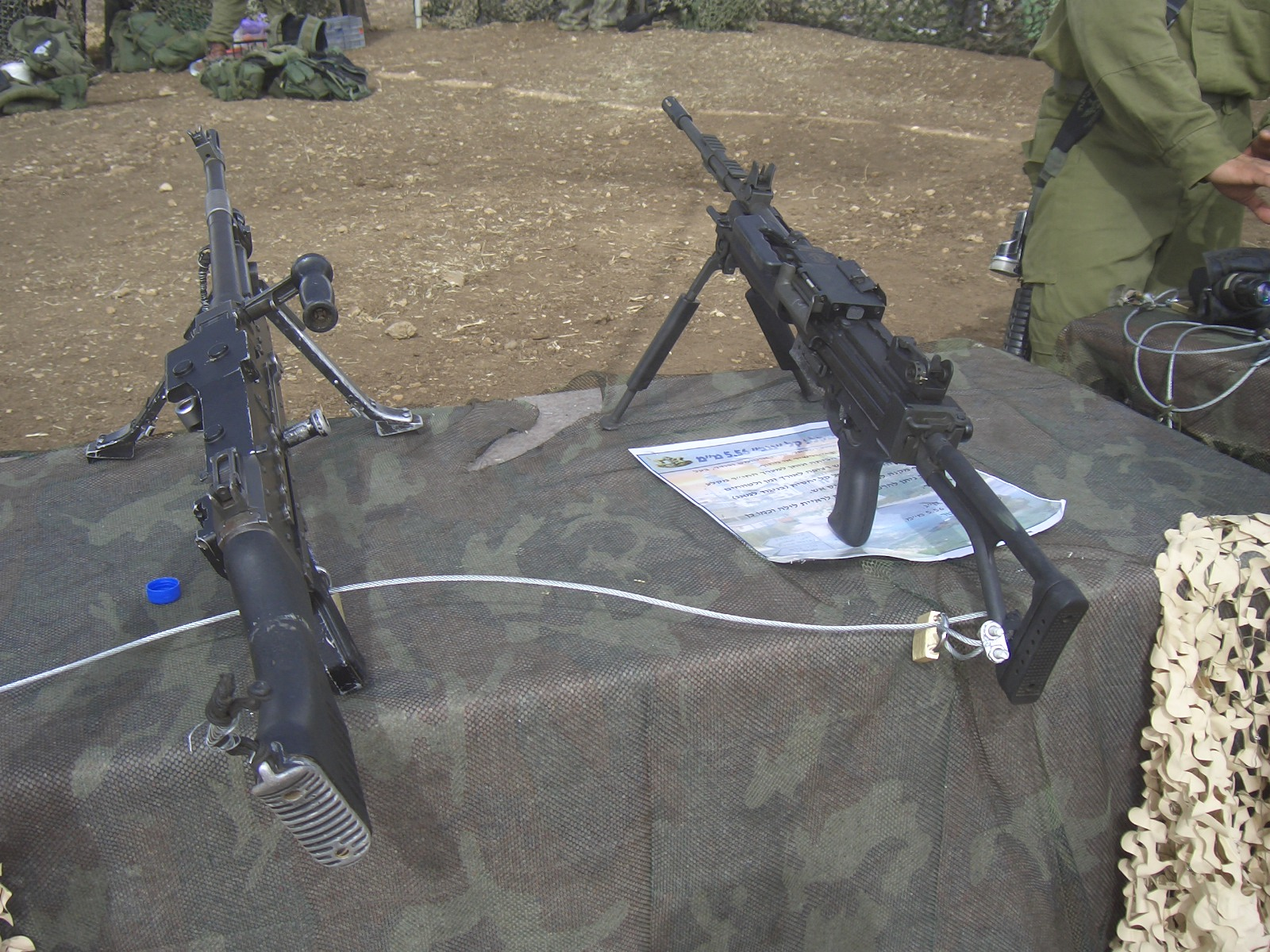 שני מקלעים קלים: הימני - מקלע נגב, השמאלי מאג